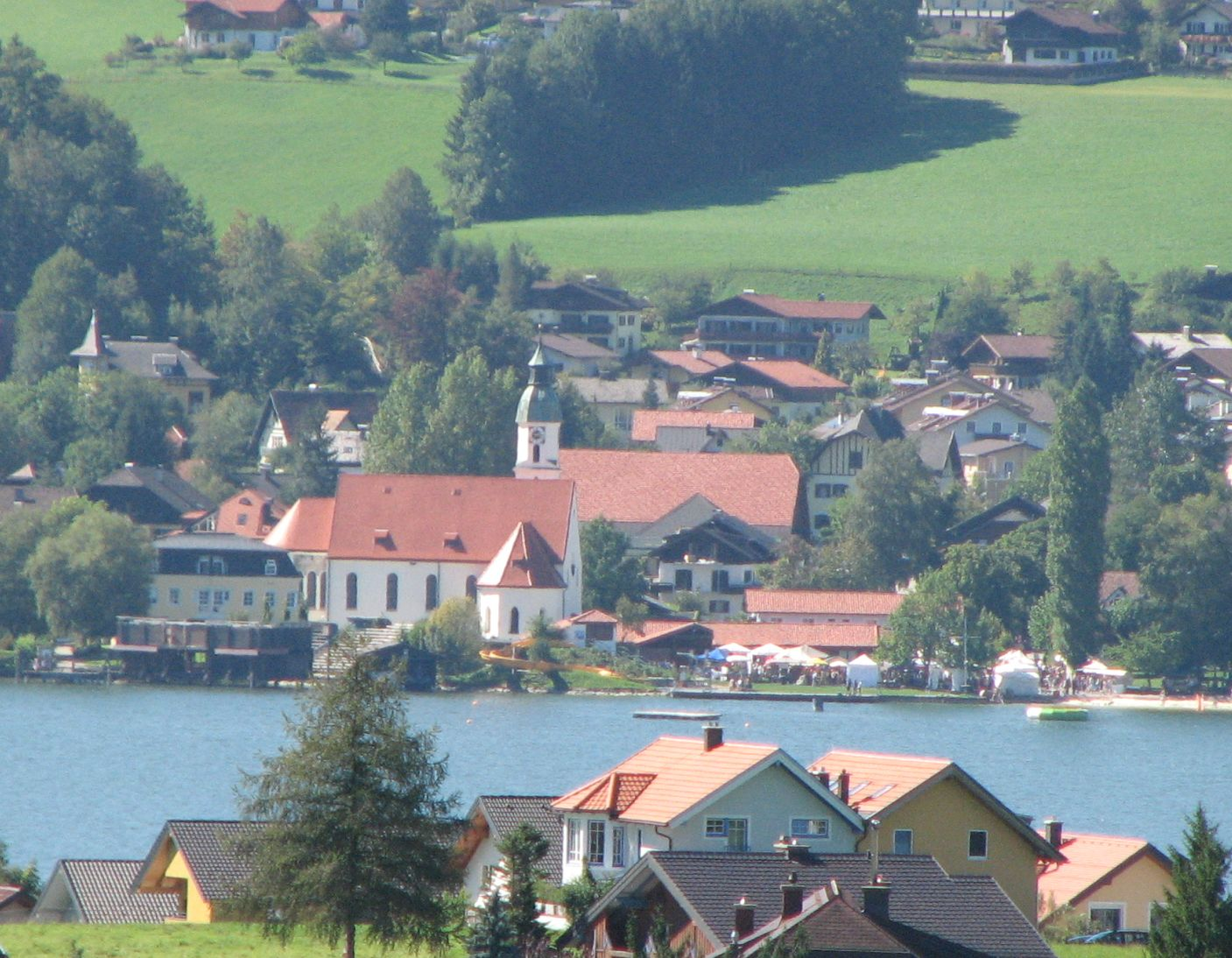 Kath. Pfarrkirche hl. Johannes der Täufer, Seeham